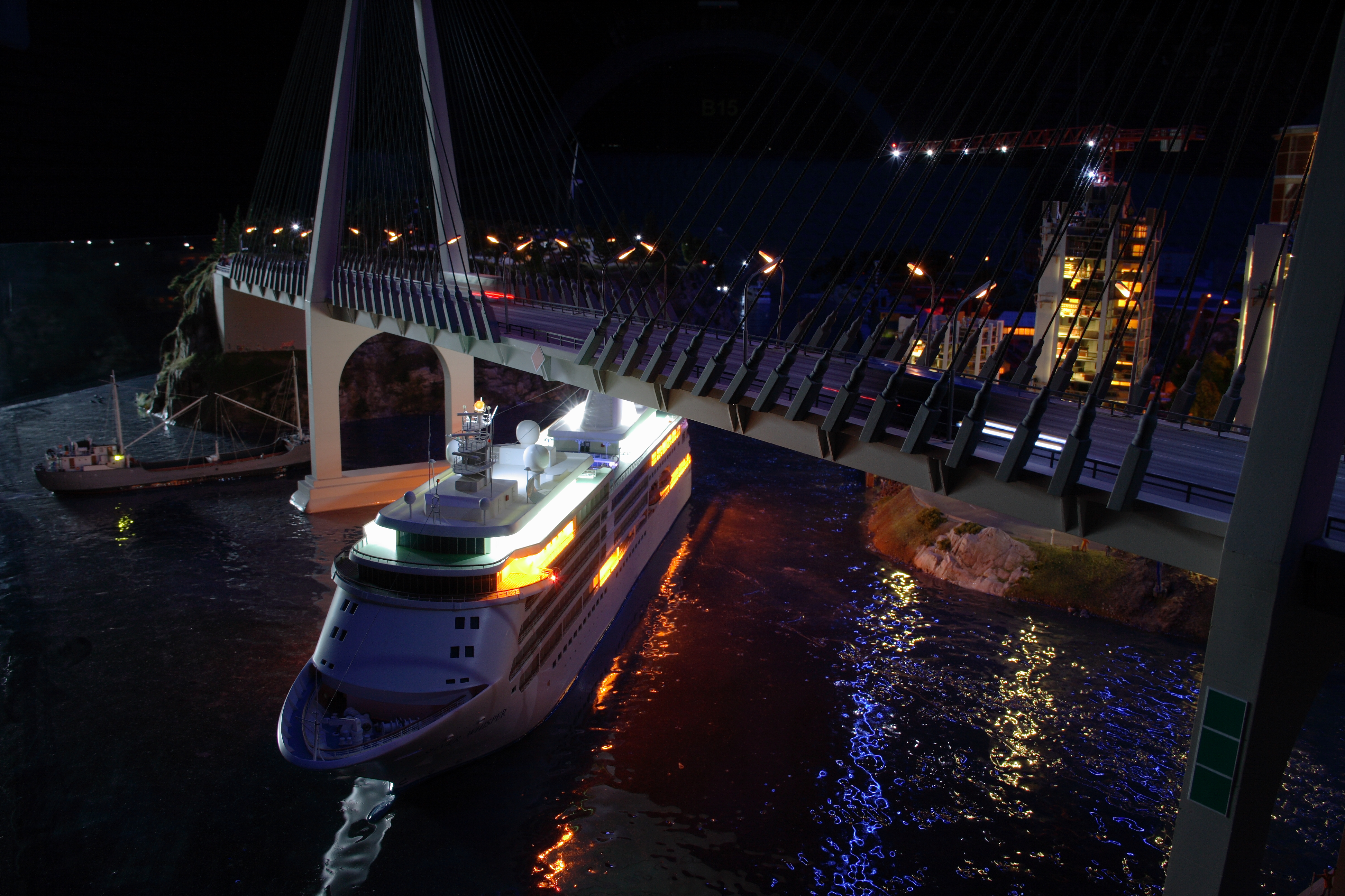 Ночь в Гранд Макете